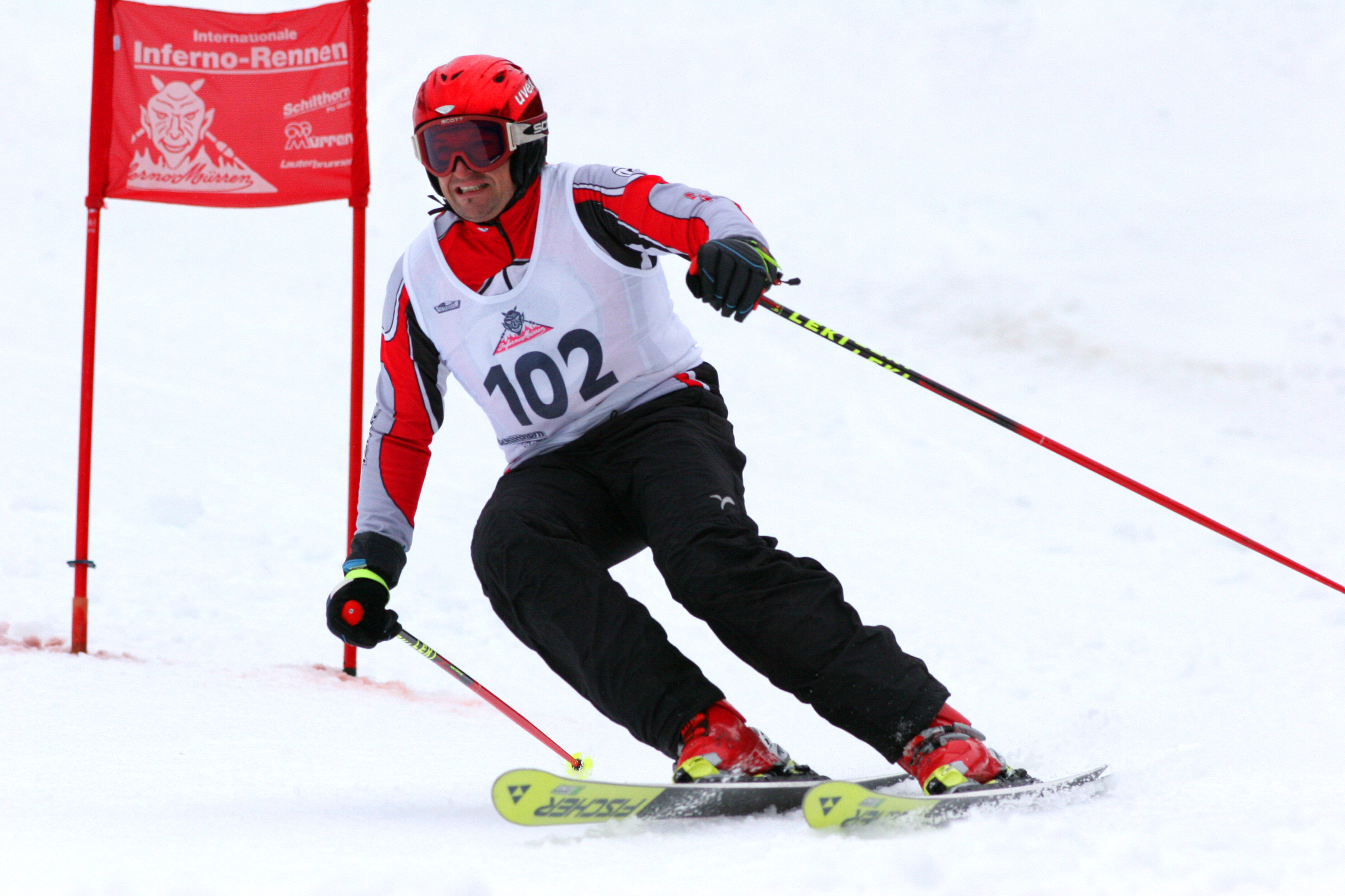 Internationale Inferno-Rennen Mürren